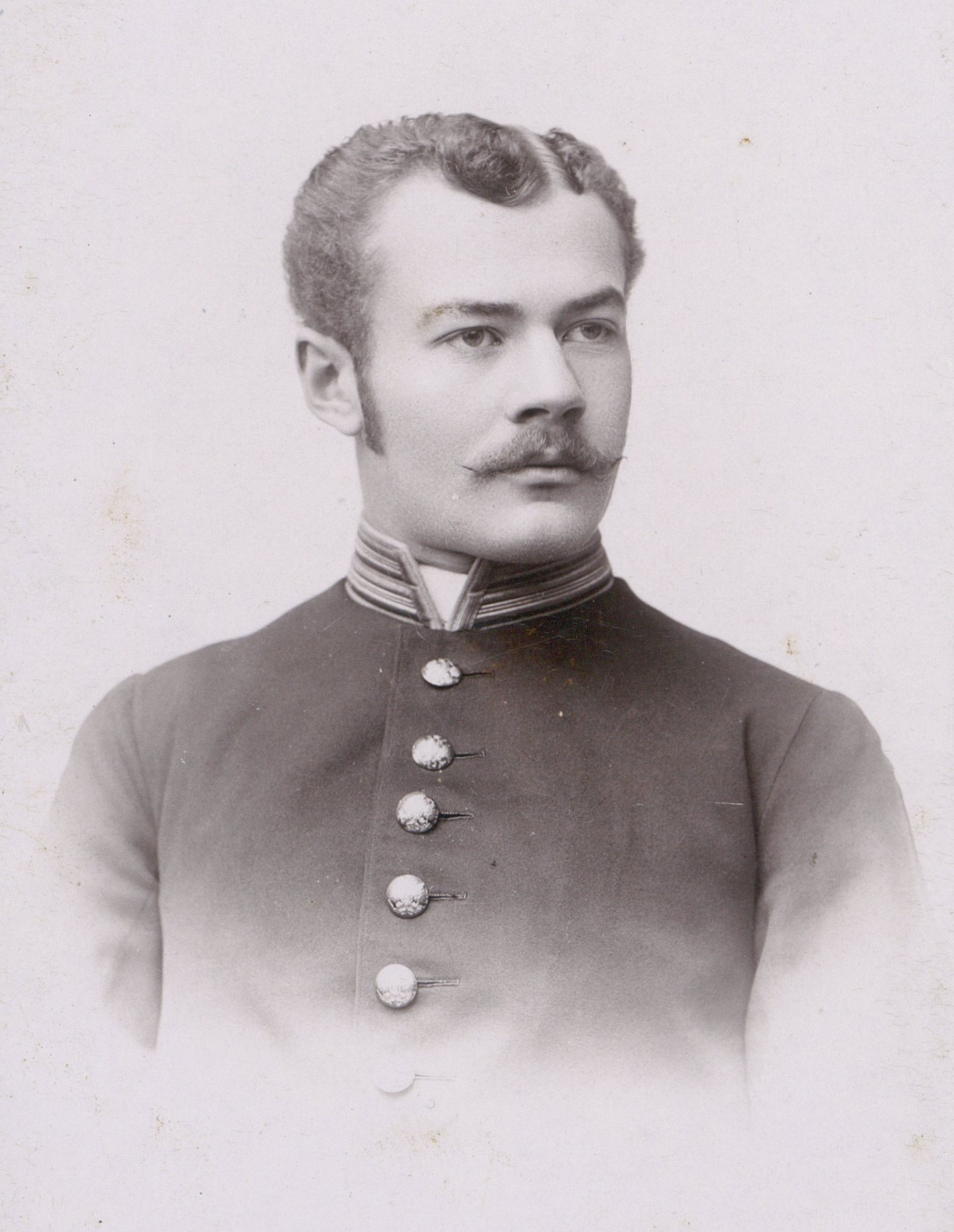 Emil Bursche, ok. 1893 r.